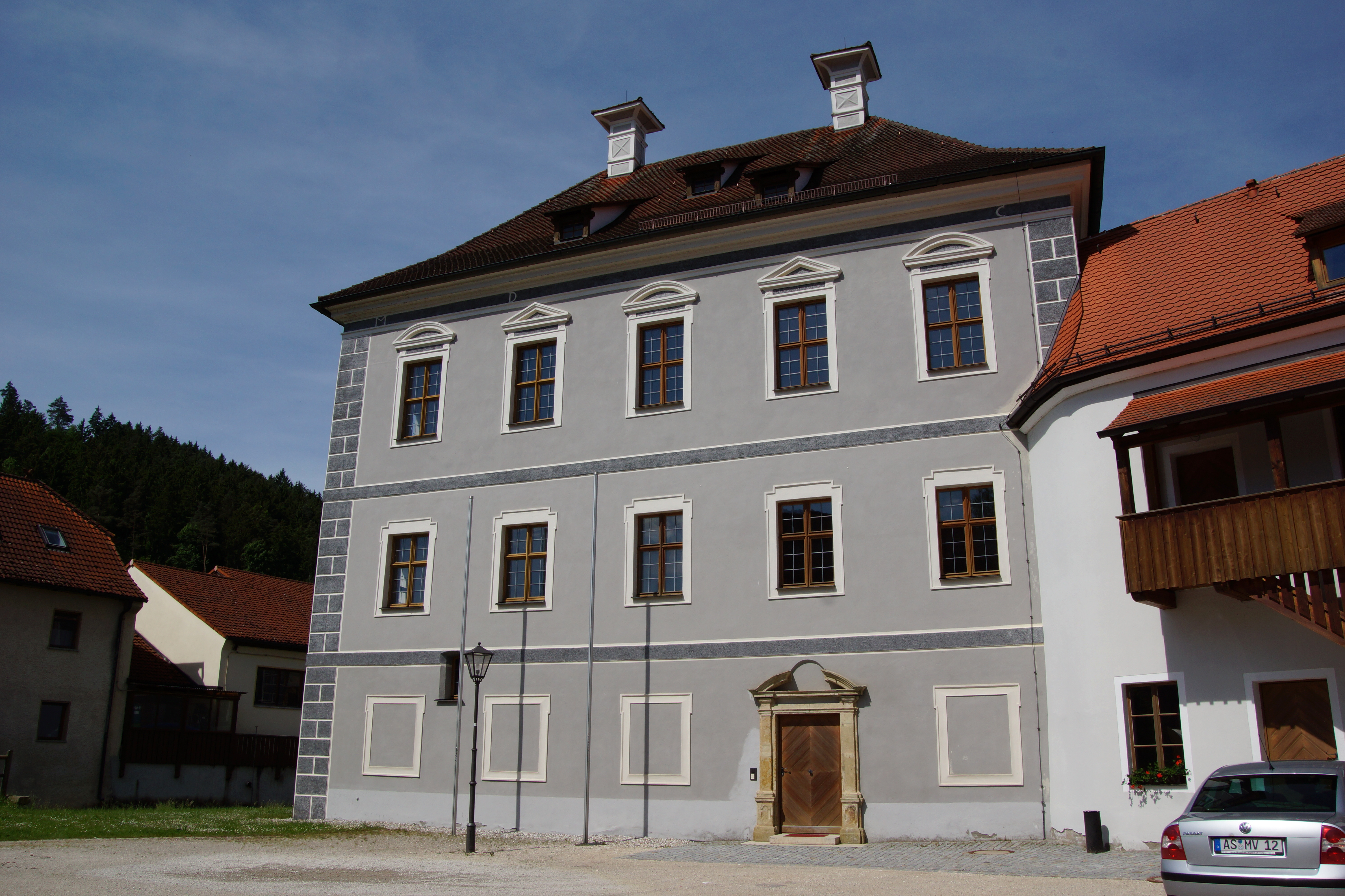 Das Hammerschloss oder auch Untere Schloss im Oberpfälzischen Markt Schmidmühlen